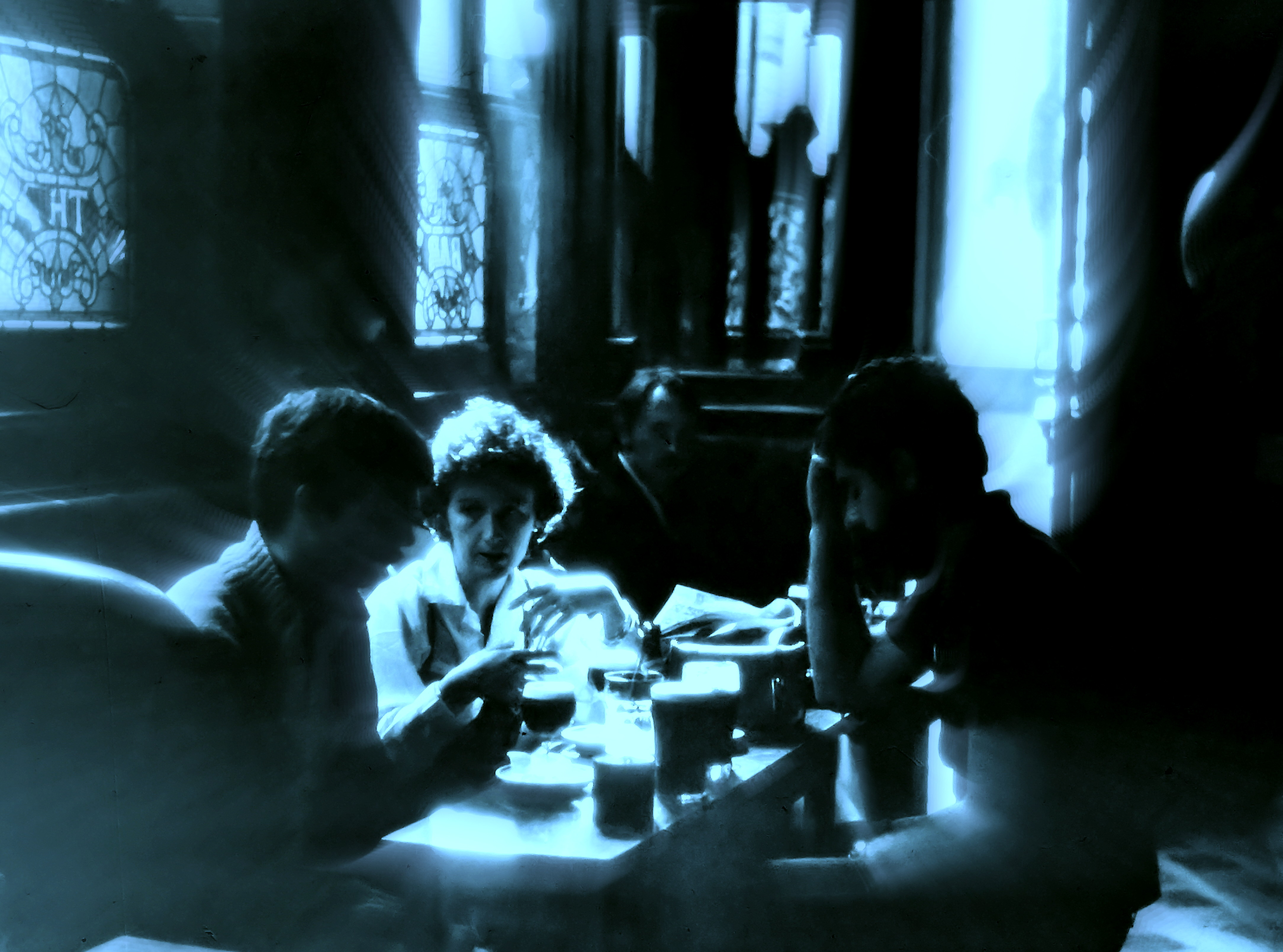 ​Encuentro de cuatro arquitectos de la “Generacion de los 80”, de derecha a izquierda: Enric Miralles, Neus Solé y Maciá Codinach. Daniel Navas detras de la camara